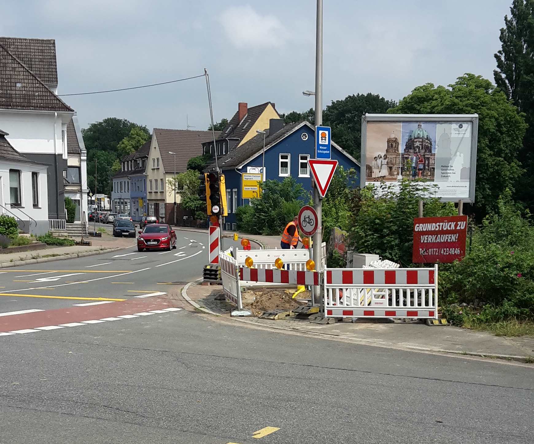 Baustellenbeschilderung in Bremen-Blumenthal